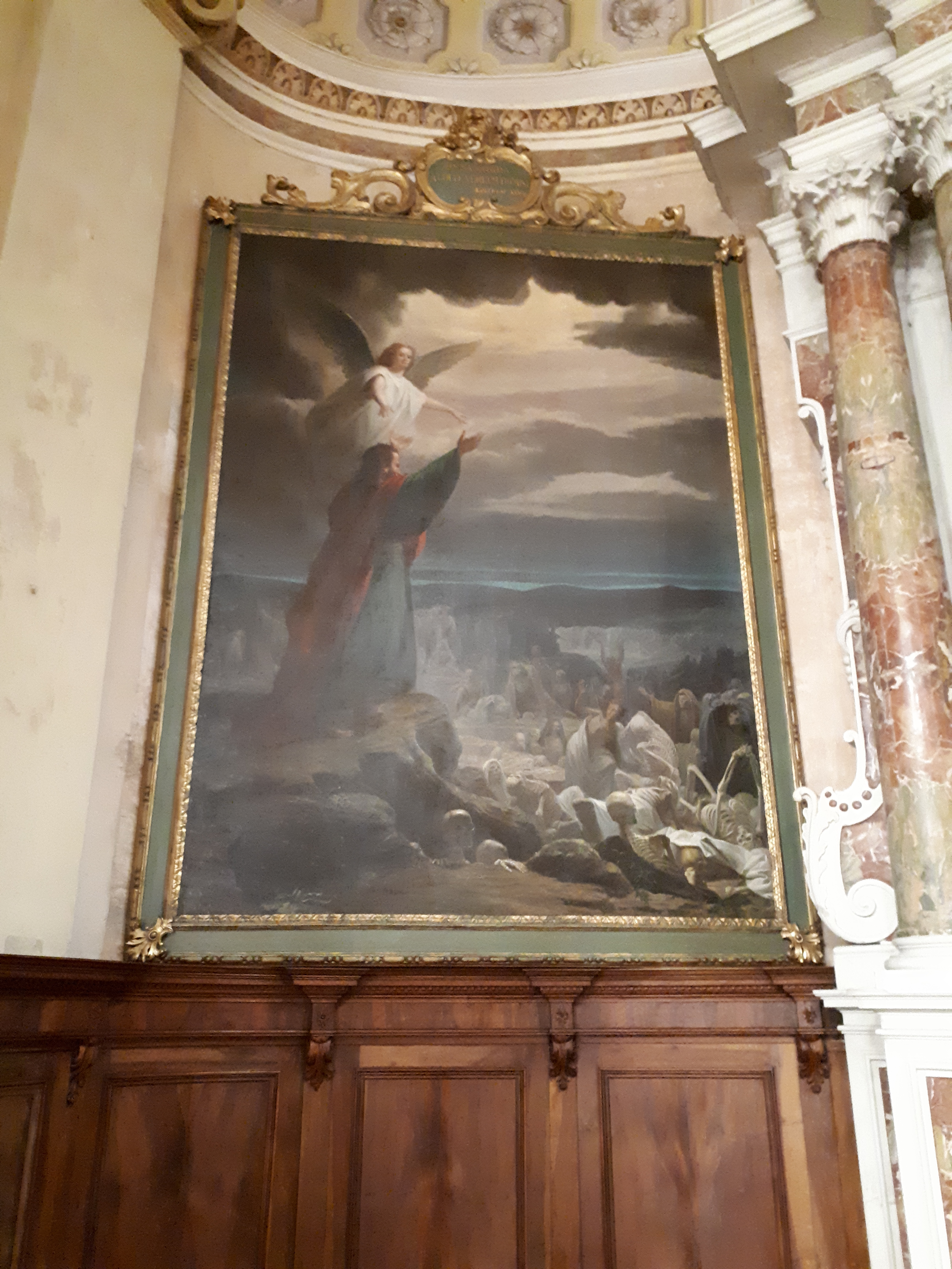 Valentino Pupin, tela